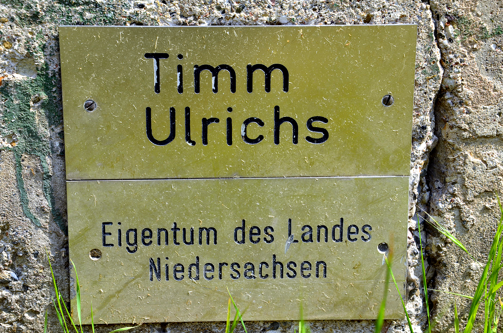 Bekanntgabe an der 1991 durch Professor Siegfried Neuenhausen in Hannover-Hainholz initiierten Bilderwand Bilderwand Bertramstraße: „Timm Ulrichs, Eigentum des Landes Niedersachsen“ ...